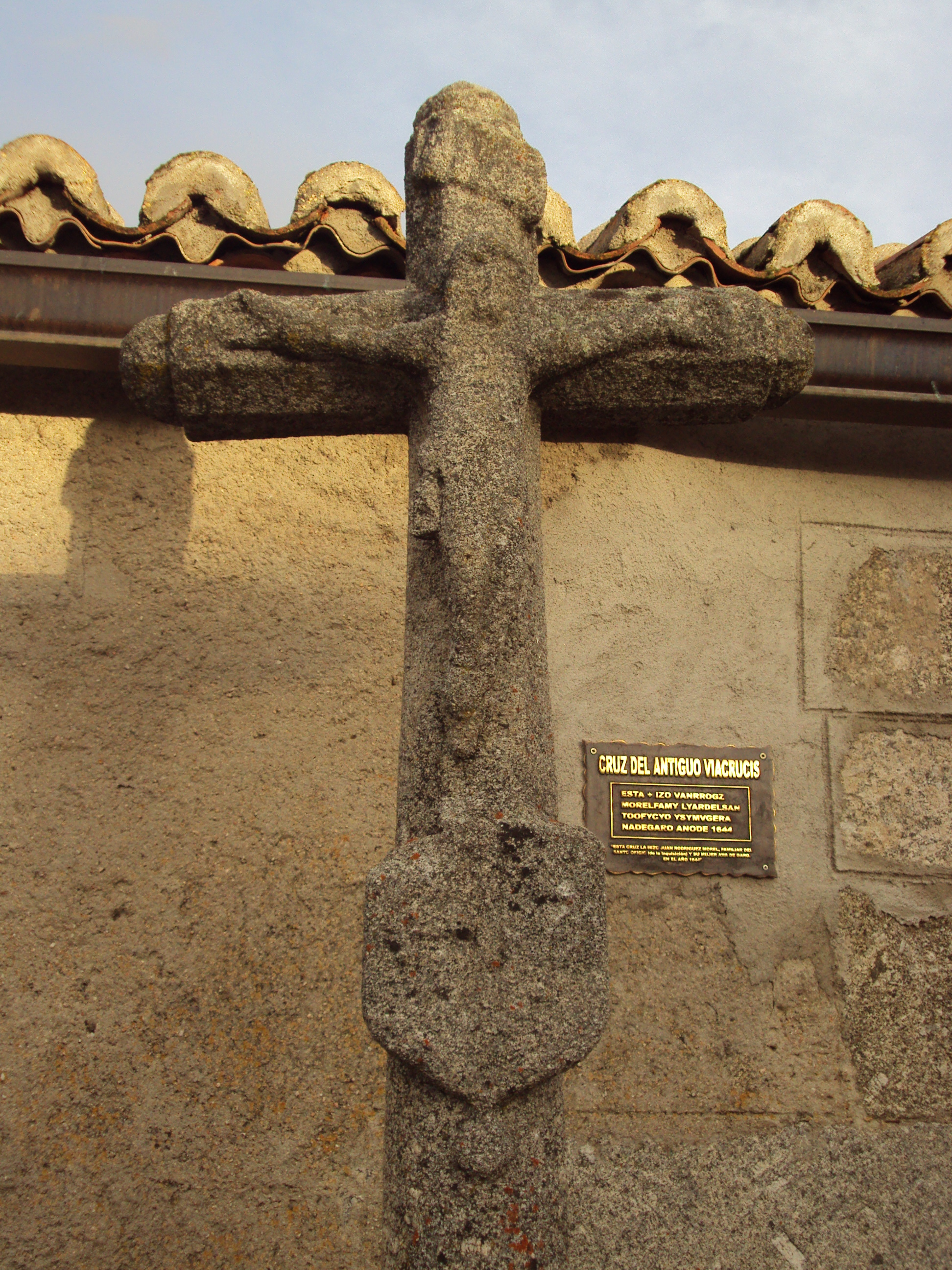 Cruz de Vía Crucis en San Miguel de Corneja (Sierra de Villafranca, Ávila, España)